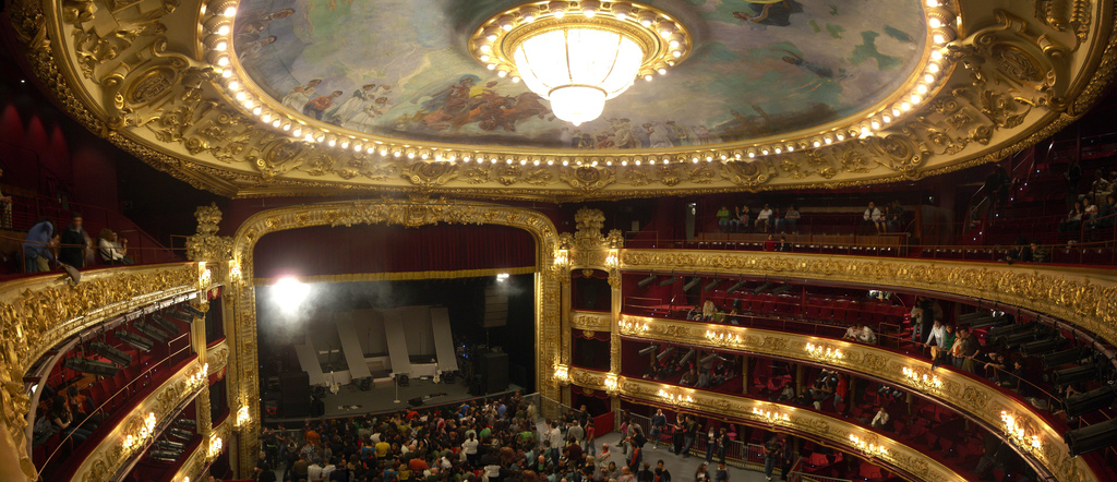 Interior del Teatro Victoria Eugenia, en San Sebastián (España)